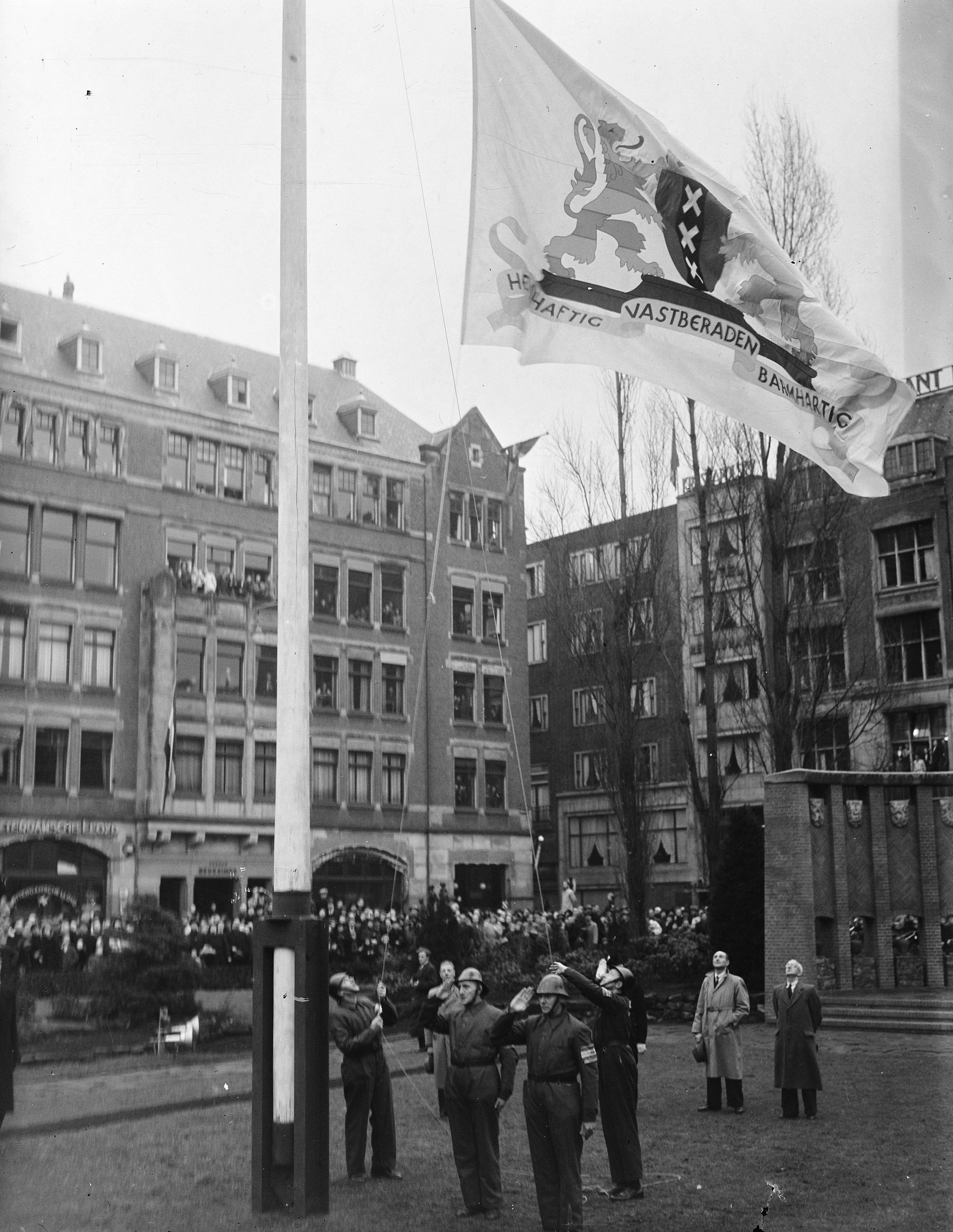 Collectie / Archief : Fotocollectie Anefo Reportage / Serie : Hare Majesteit schenkt Amsterdam nieuwe stadsvlag (met de toevoeging van de tekst 'heldhaftig, vastberaden, barmhartig') Beschrijving : De nieuwe vlag wappert Annotatie : Locatie vlaggenmast is huidige locatie Nationaal Monument op de Dam Datum : 17 december 1947 Locatie : Amsterdam Trefwoorden : vlaggen Fotograaf : Noske, J.D. / Anefo Auteursrechthebbende : Nationaal Archief Materiaalsoort : Glasnegatief Nummer archiefinventaris : bekijk toegang 2.24.01.09 Bestanddeelnummer : 902-5136 Reacties Geplaatst door Maaike op 04 februari 2014 - 22:21. De nieuwe vlag van Amsterdam met de toevoeging van de tekst 'heldhaftig, vastberaden, barmhartig' geschonken door koningin Wilhelmina plaats: Amsterdam, Noord-Holland